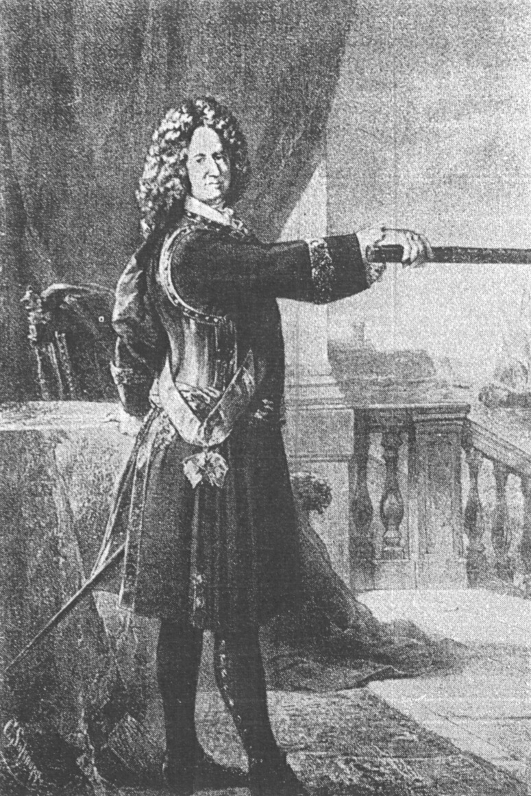 Generalfeldmarschall und Diplomat